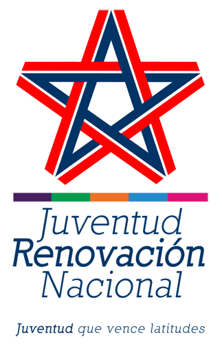 Logo oficial Juventud Renovación Nacional.